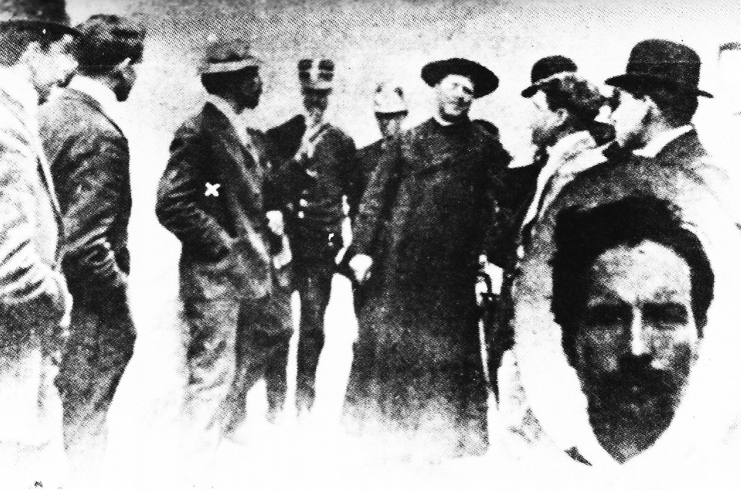 Biófilo Panclasta (tercero, de izquierda a derecha), expone sus ideas desde la cárcel.